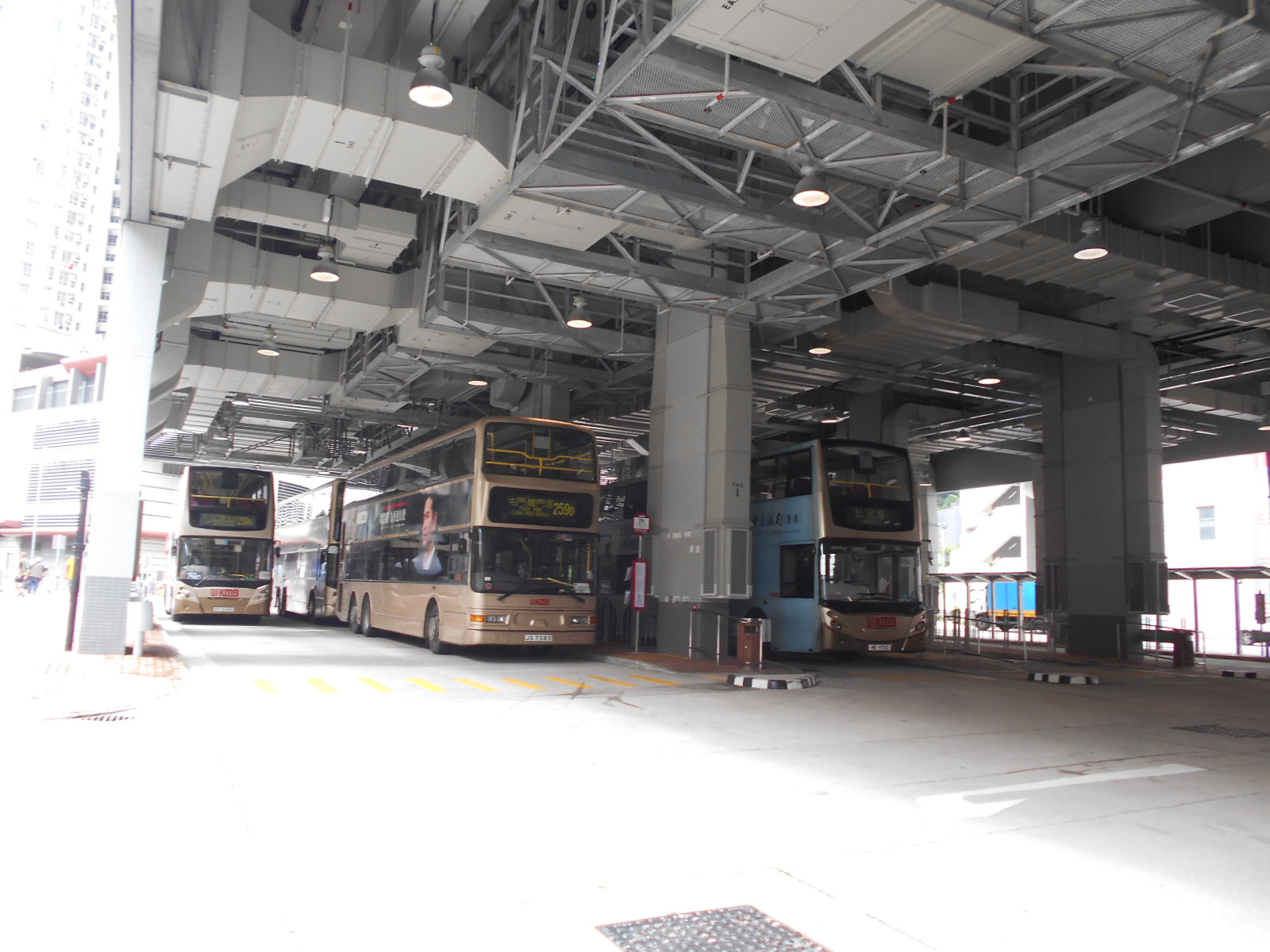 中文（香港）: 鯉魚門邨巴士總站(2016年)